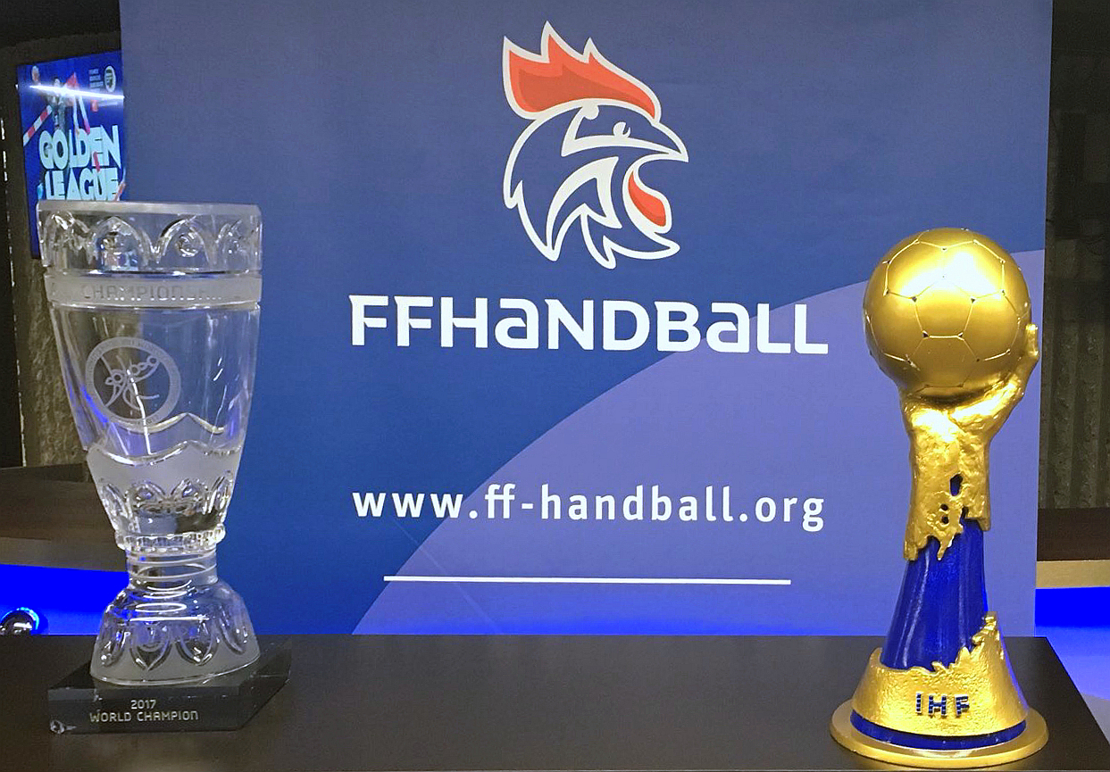 Présentation des deux trophées de champion du monde 2017 de handball masculin (à droite) et féminin (à gauche). Le 06 janvier 2018 à l'occasion de la Golden League organisée à l'Accord hotel Aréna, Paris.